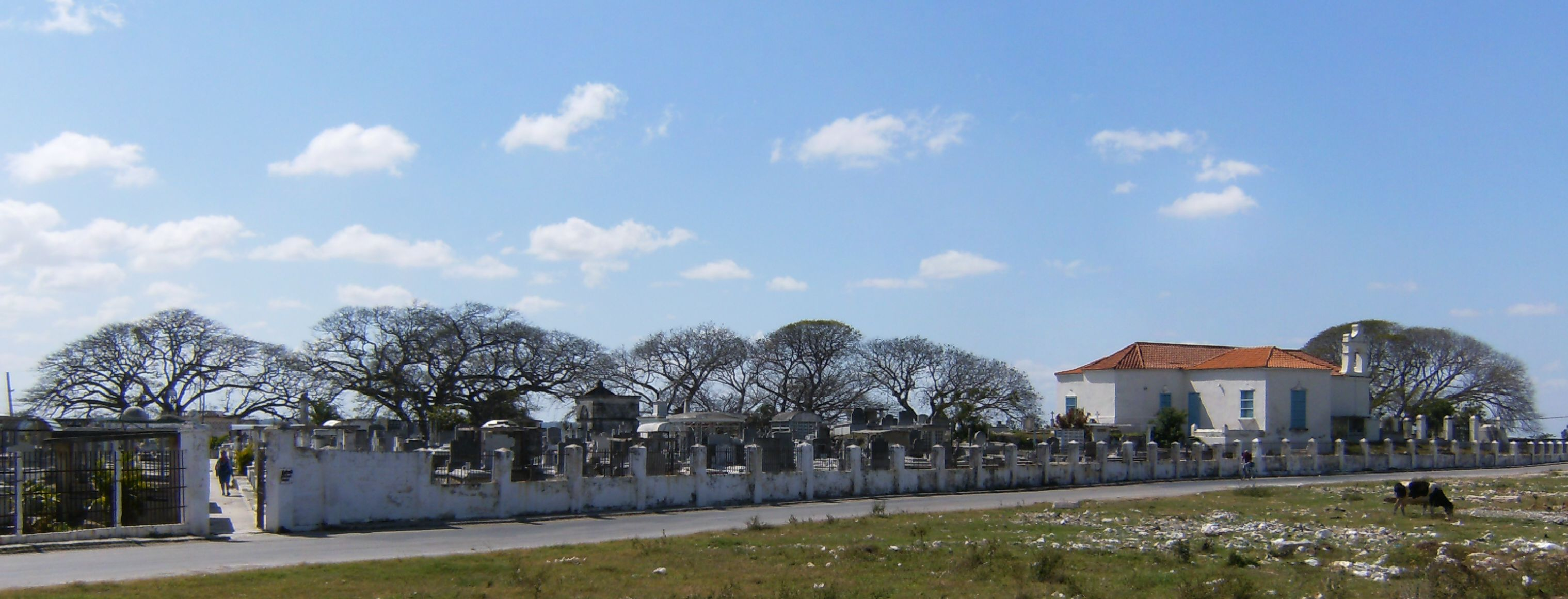 Cementerio mas antiguo del municipio Guanabacoa, en Cuba